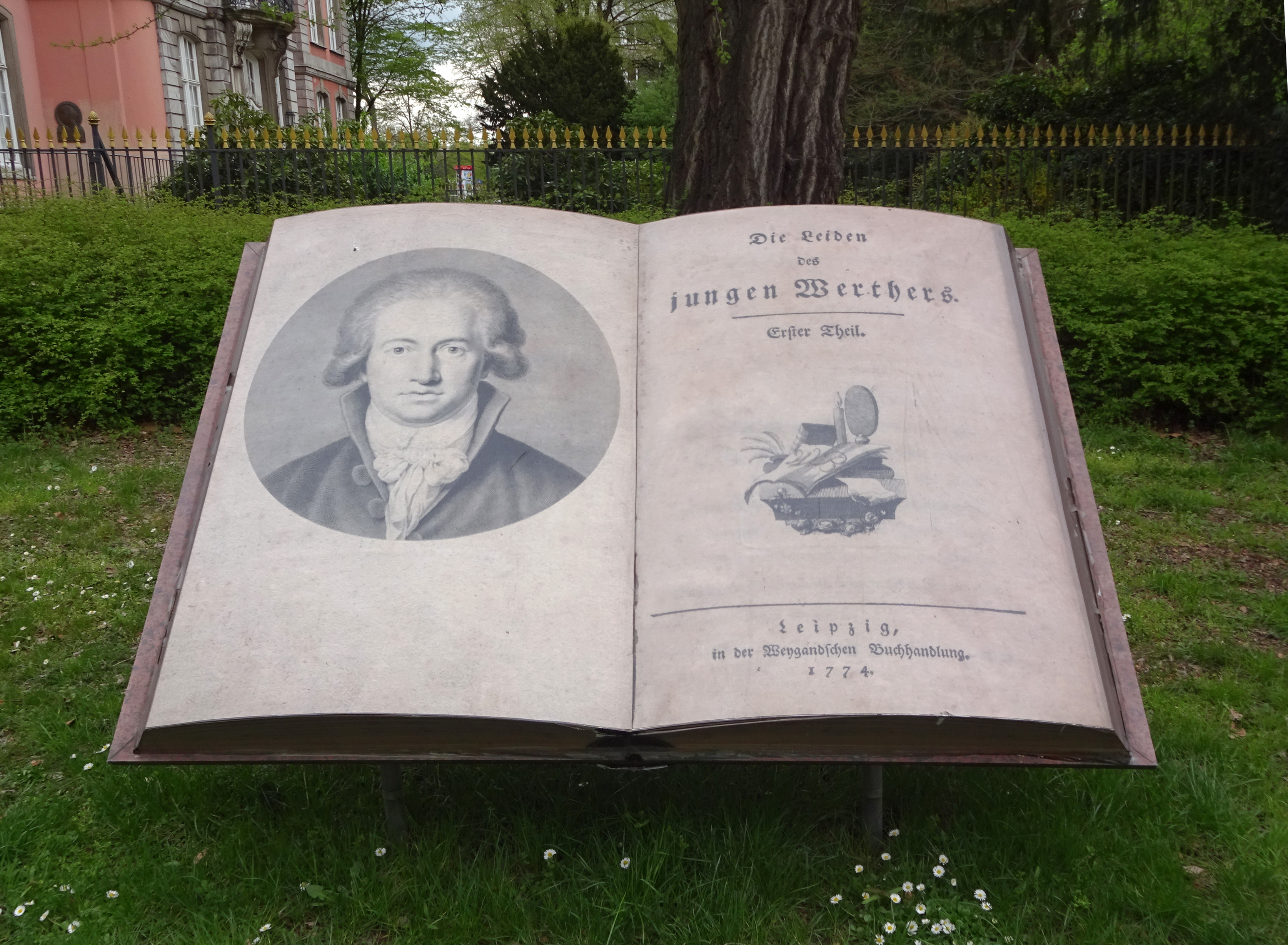 Faksimile einer Doppelseite aus dem Roman "Die Leiden des jungen Werthers" von Johann Wolfgang von Goethe des Goethe Museums, aufgestellt an der Malküstenstraße (April 2018)